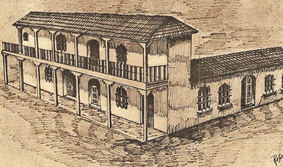 Reconstrucción del antiguo edificio colonial del Cabildo de la ciudad argentina de Santiago del Estero.